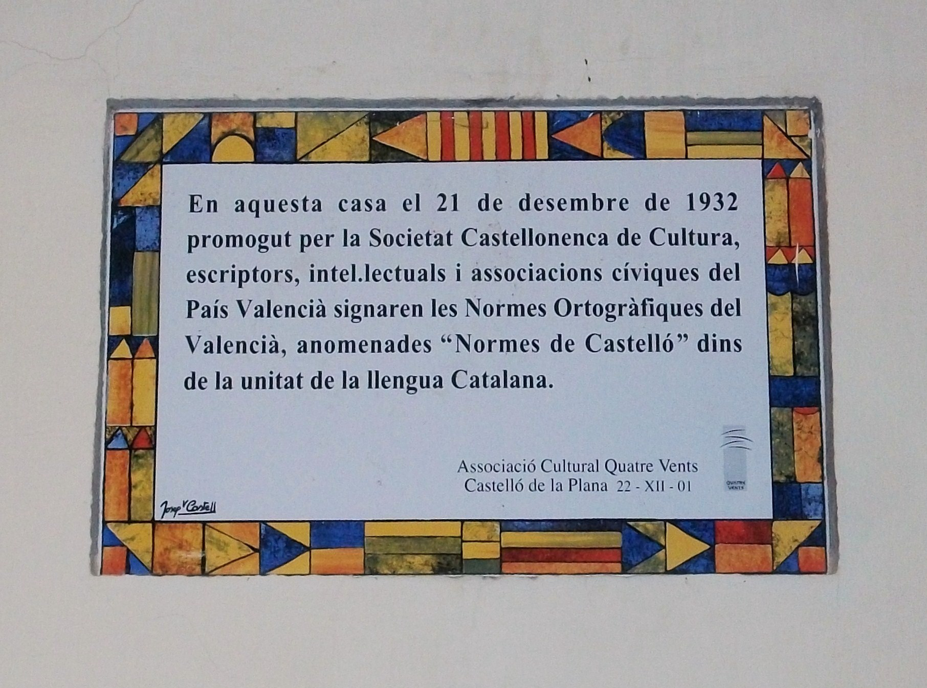 Placa commemorativa de les Normes de Castelló, carrer Cavallers de Castelló de la Plana.